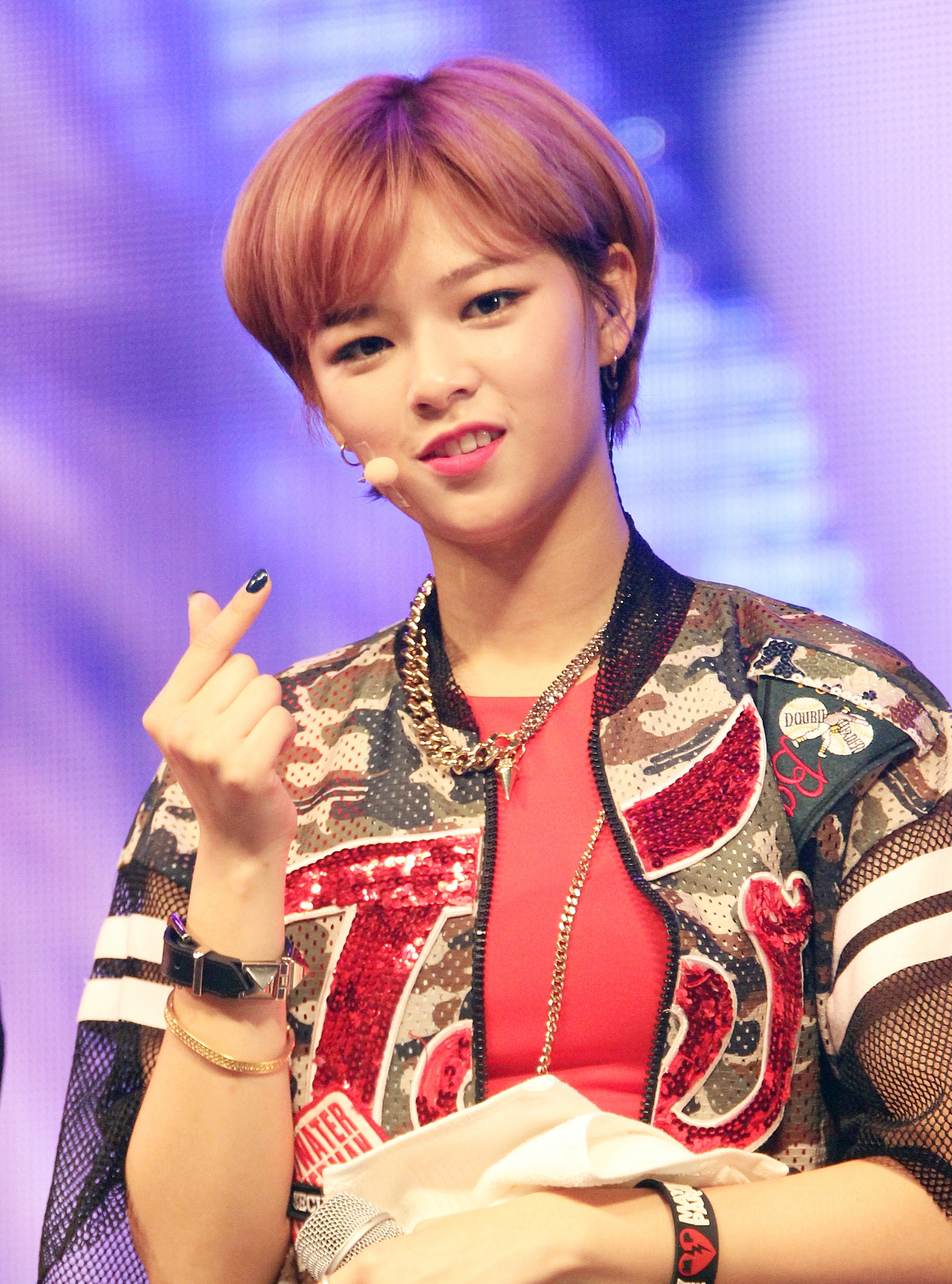 151020 트와이스 - 데뷔 쇼케이스 TWICE - Debut Showcase